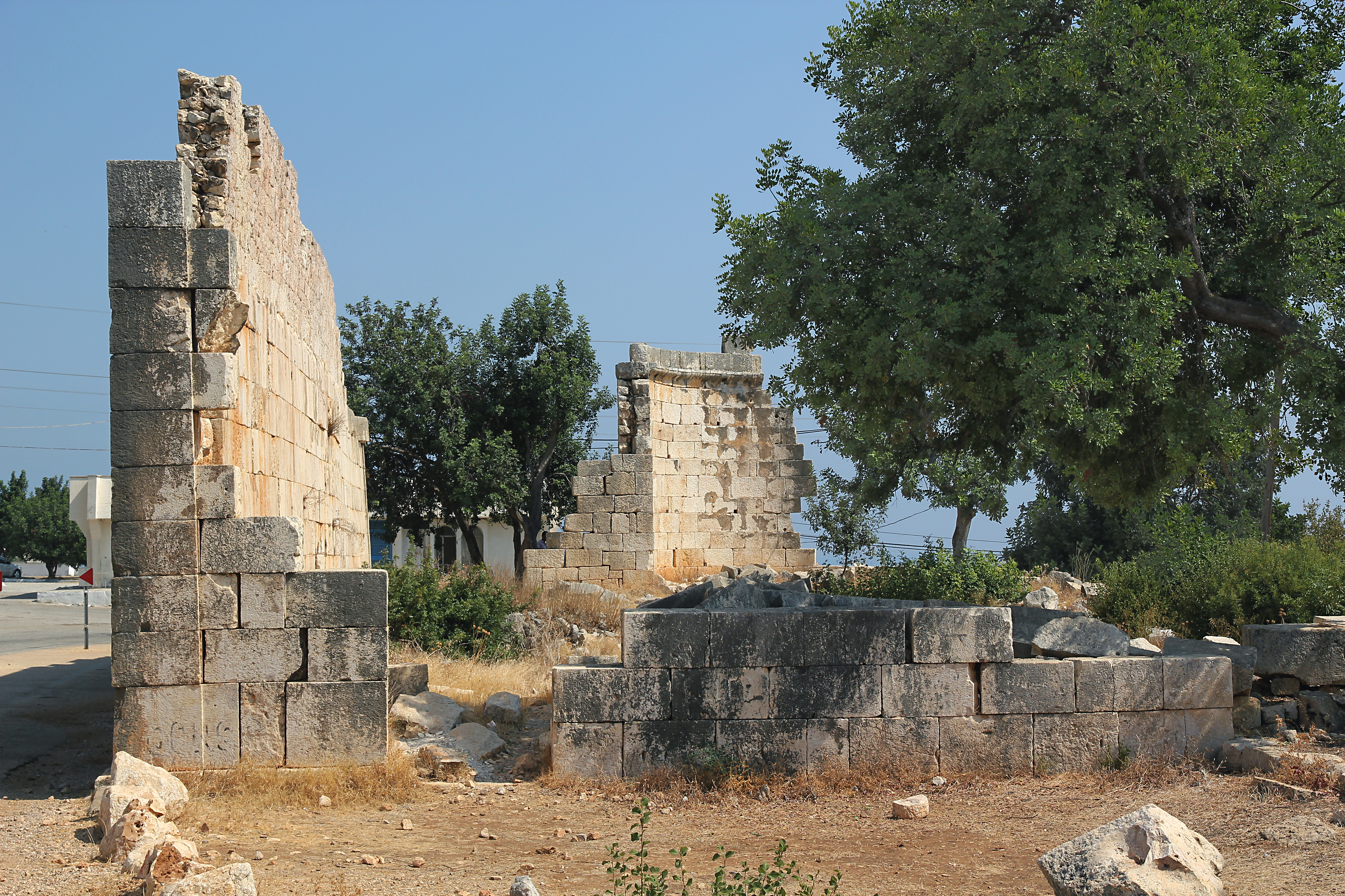 Ruinen eines zur Basilika umgebauten Zeustempels, Cennet ve Cehennem bei Silifke, Südtürkei